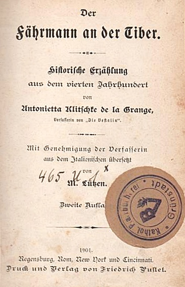 Antonietta Klitsche de la Grange (1832-1912), Buchautorin , Enkeltochter des Prinzen Louis Ferdinand von Preußen, Buchtitelblatt eines ihrer Werke